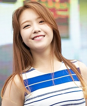 김해 워터파크 미니 콘서트에서 민아